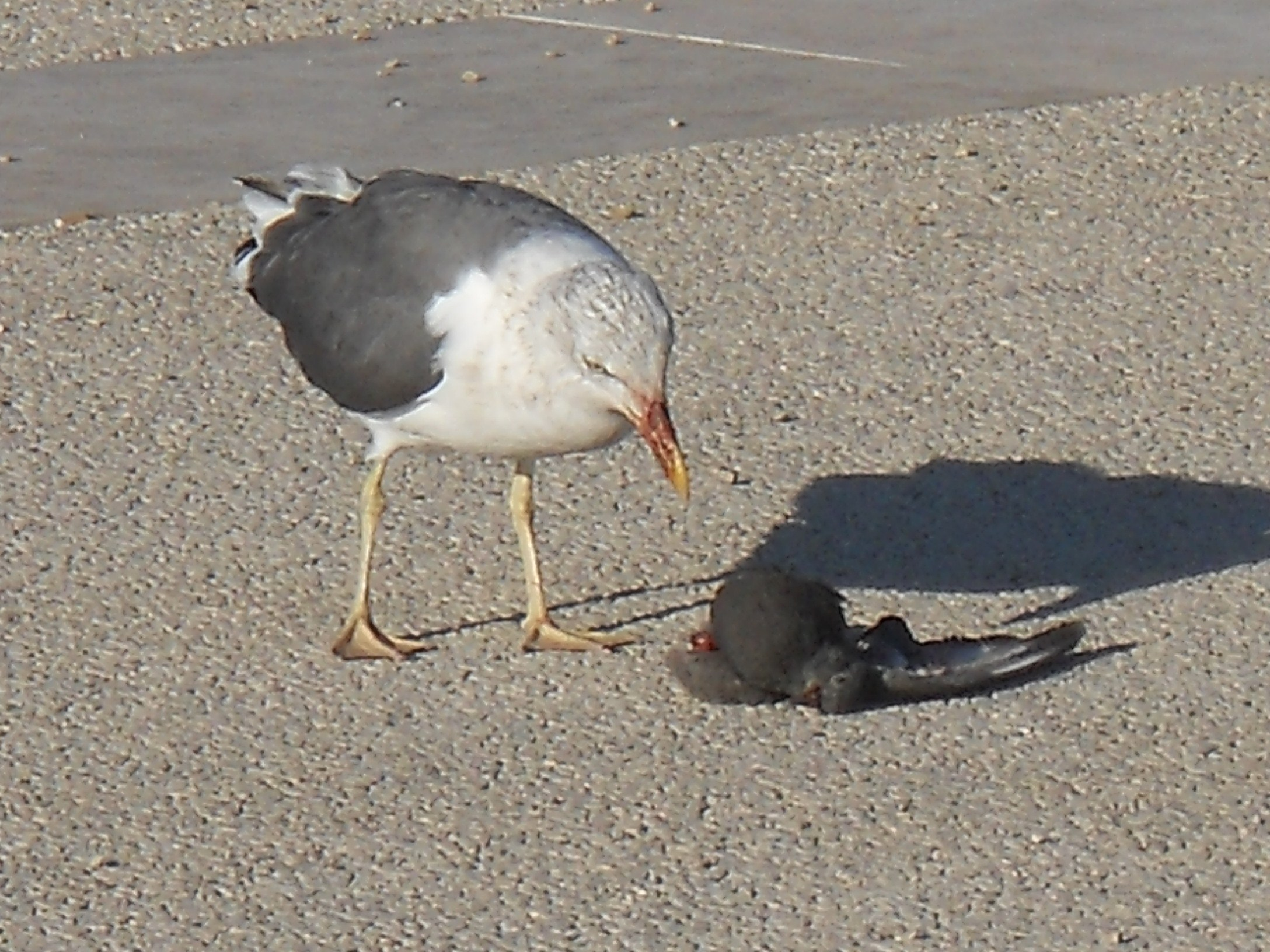 Lisbon Portugal 495